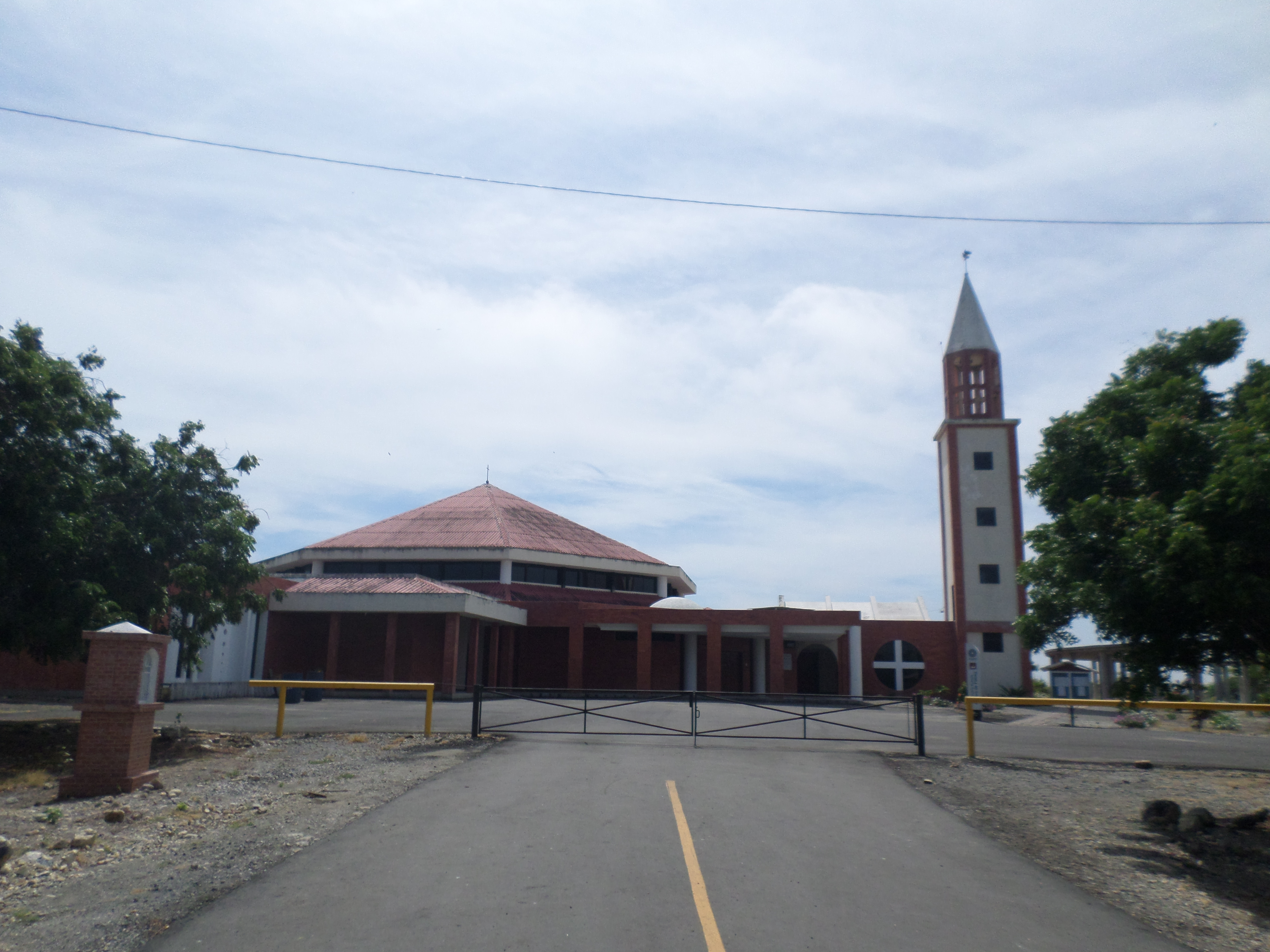 Vista de la entrada del Santuario